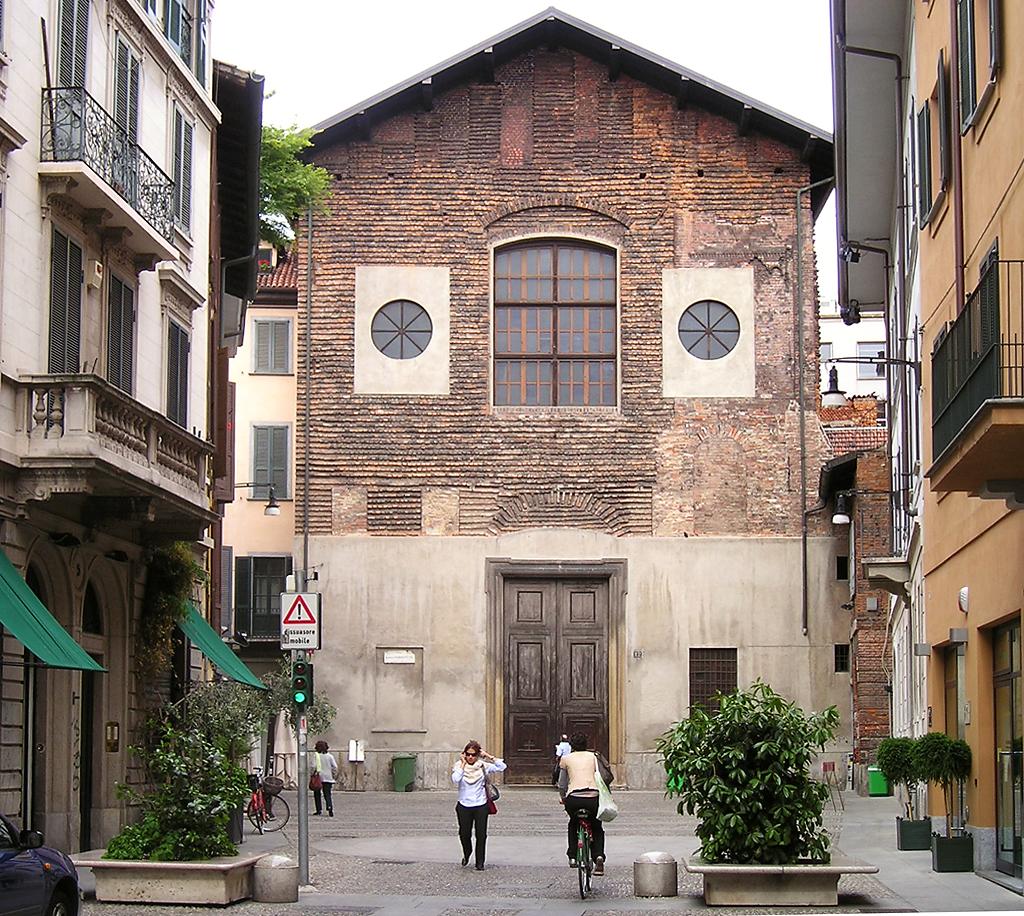 Milano, la chiesa sconsacrata di San Carpoforo.